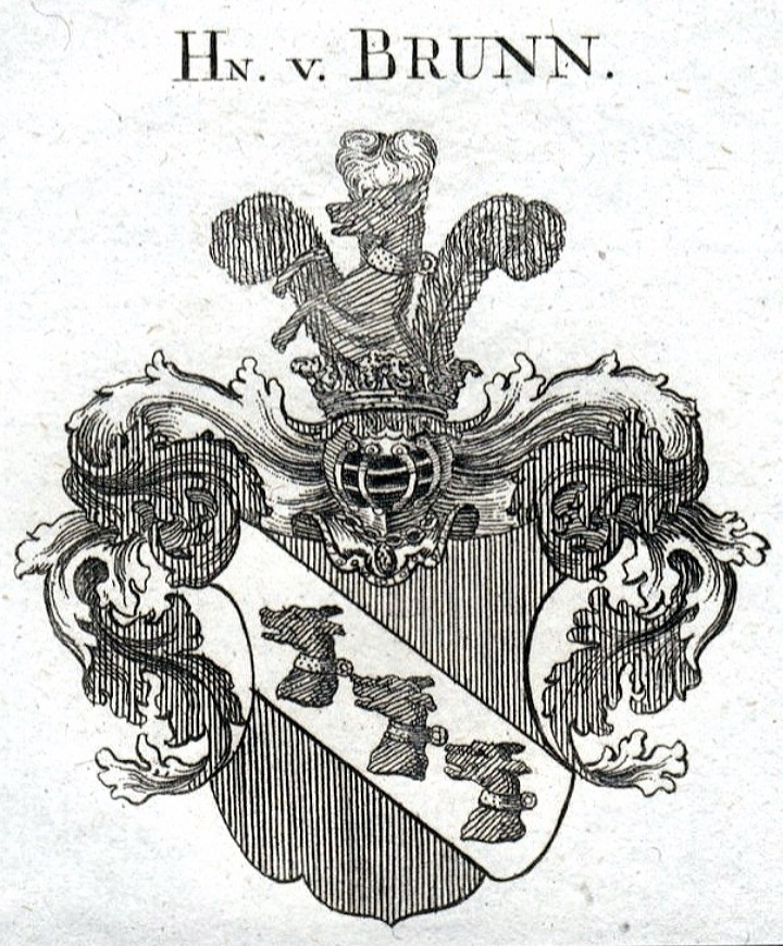 Wappen des mittelmärkischen Uradelsgeschlechts von Brunn, hier irrtümlich mit Doggen- statt Bärenköpfen.